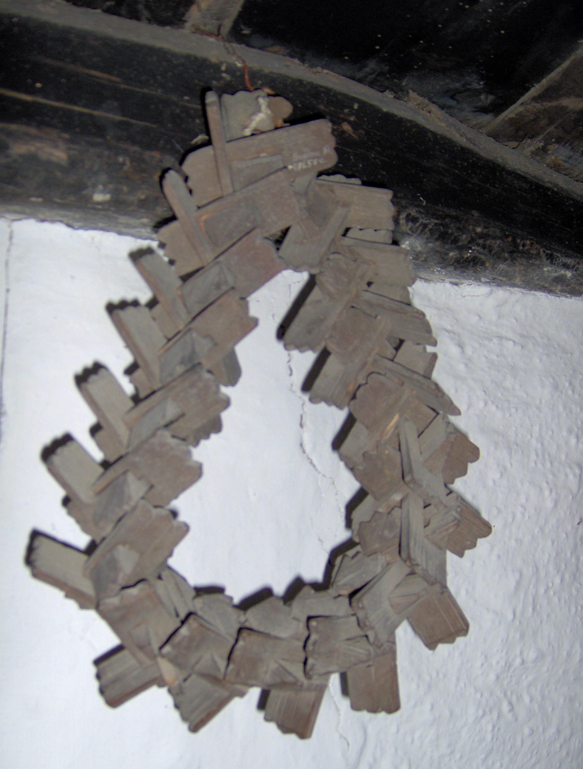 Gærkrans, fotograferet på Frilandsmuseet ved København